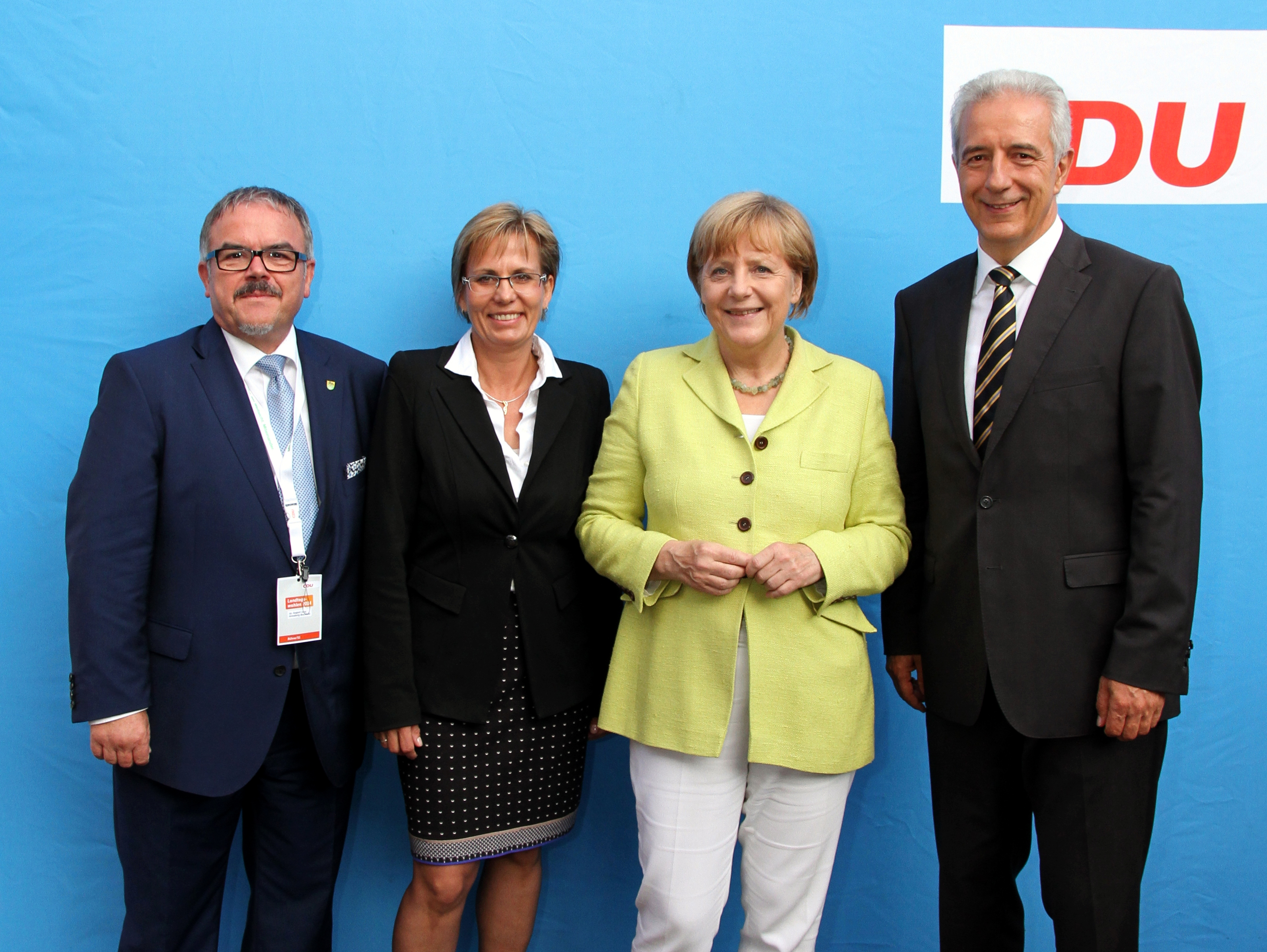 Barbara Klepsch (ehemalige Oberbürgermeisterin von Annaberg-Buchholz und seit 2014 Sächsische Sozialministerin) auf einer Wahlkampfveranstaltung 2014 in Annaberg-Buchholz zusammen mit Landrat Frank Vogel und Bundeskanzlerin Angela Merkel und Ministerpräsident Stanislaw Tillich (v.l.n.r.)